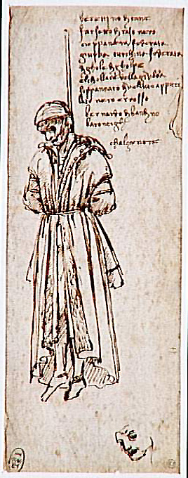 Retrato de Bernardo di Bandino Baroncelli executado